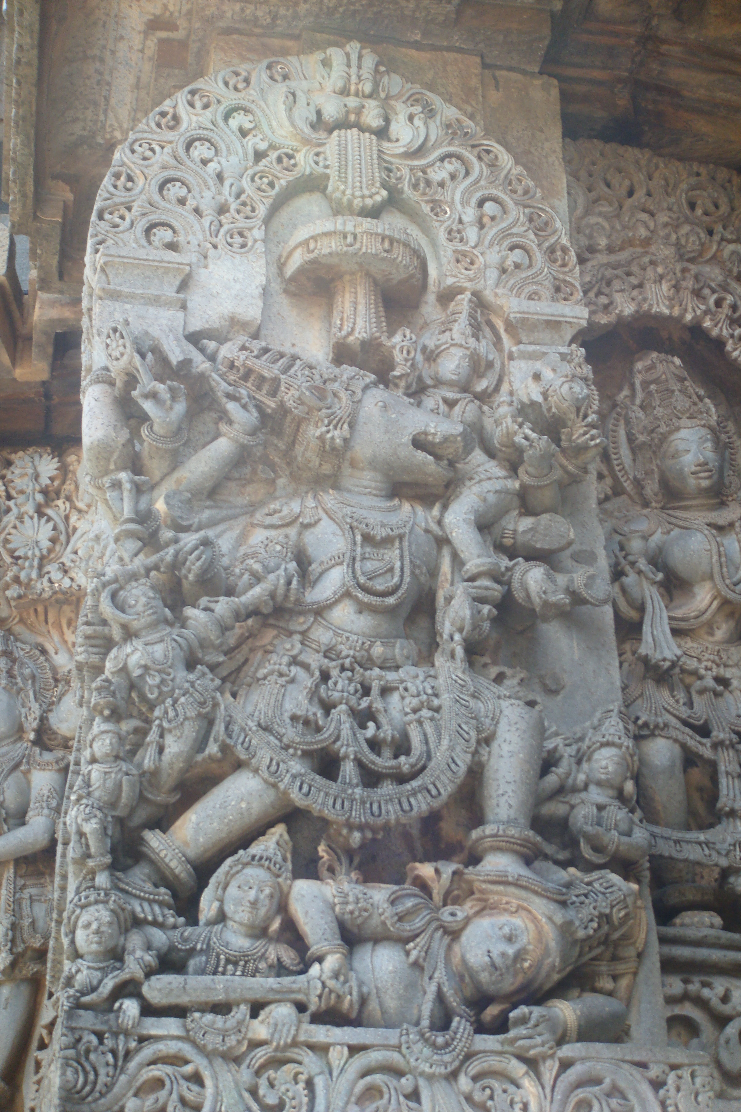 varaha Halebid